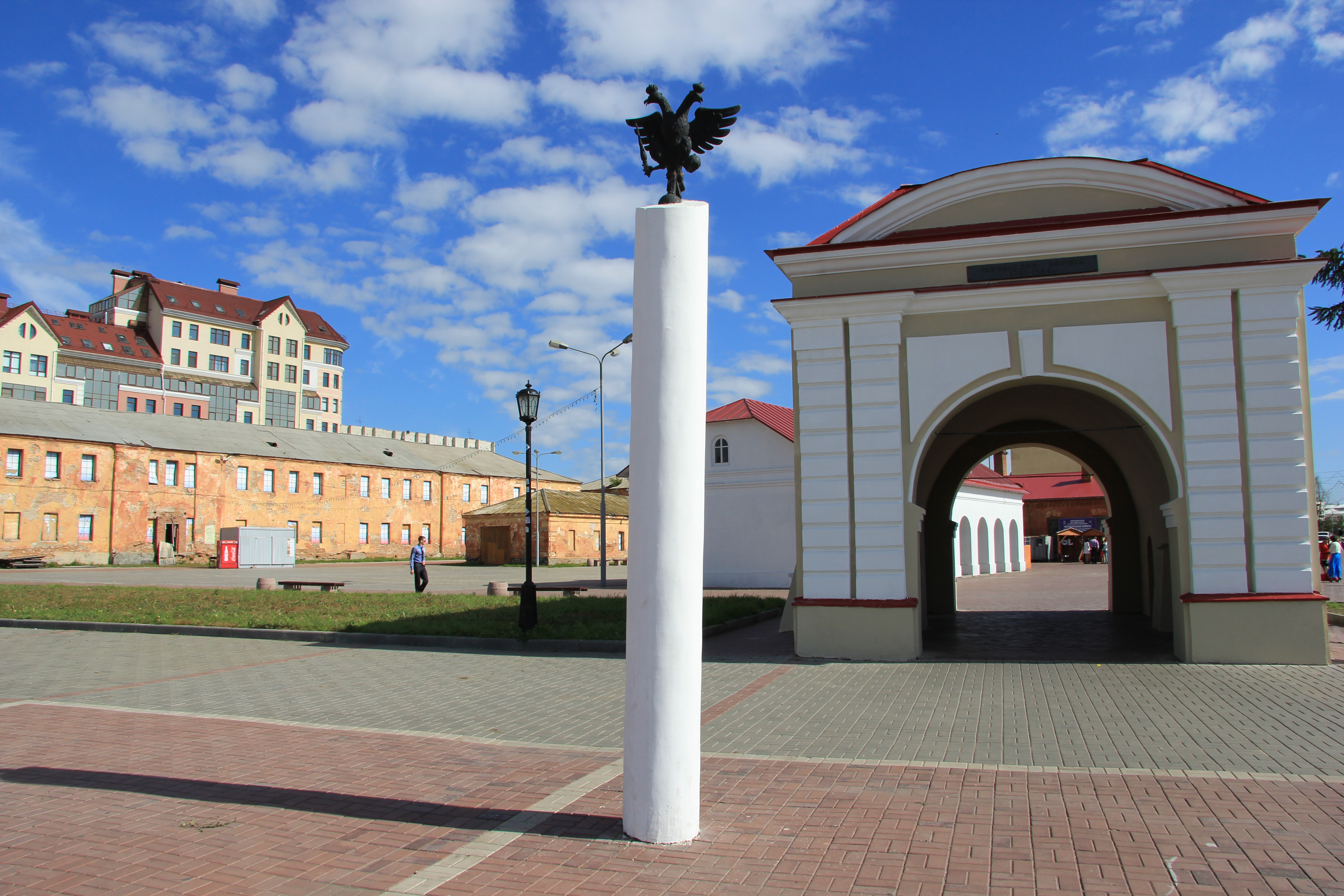 Ворота Тобольские Омской крепости (Омская область, Омск, Тухачевского наб.)